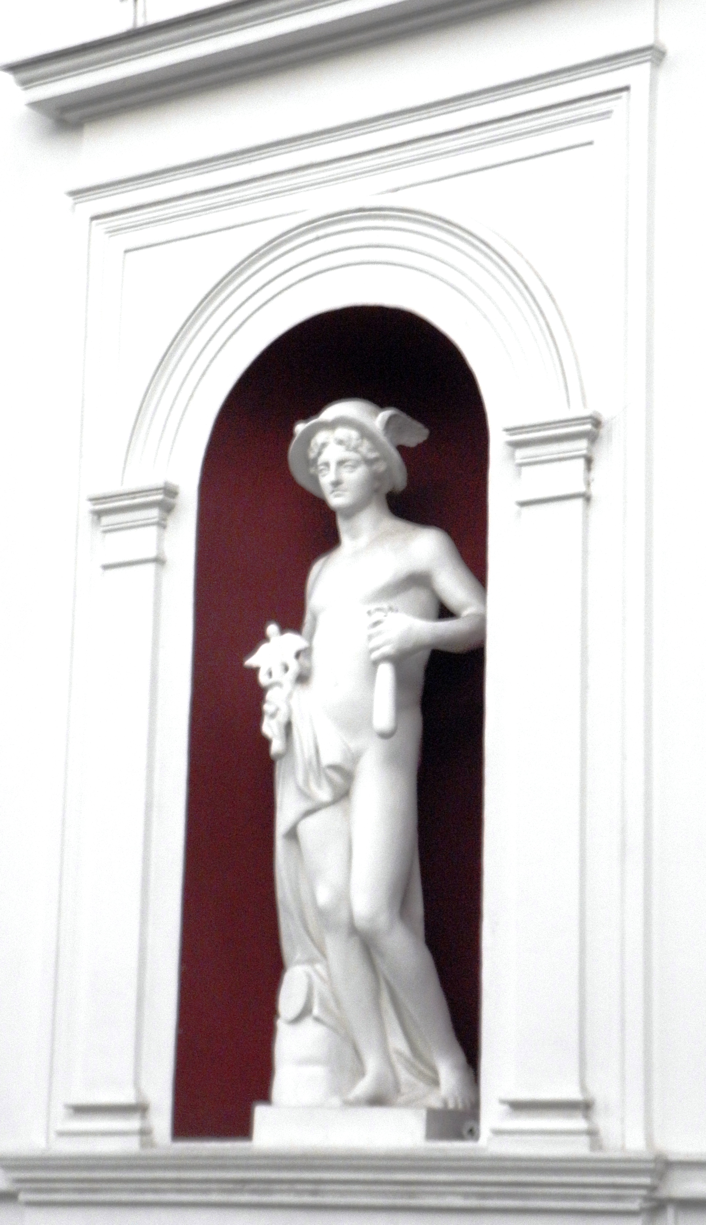 Будівля старої біржі, де 14 (27) січня 1918 року відбулися загальні збори робітничих, селянських, матроських і солдатських депутатів, на яких було проголошено радянську владу у м. Одесі, Одеса, пл. Думська, 1